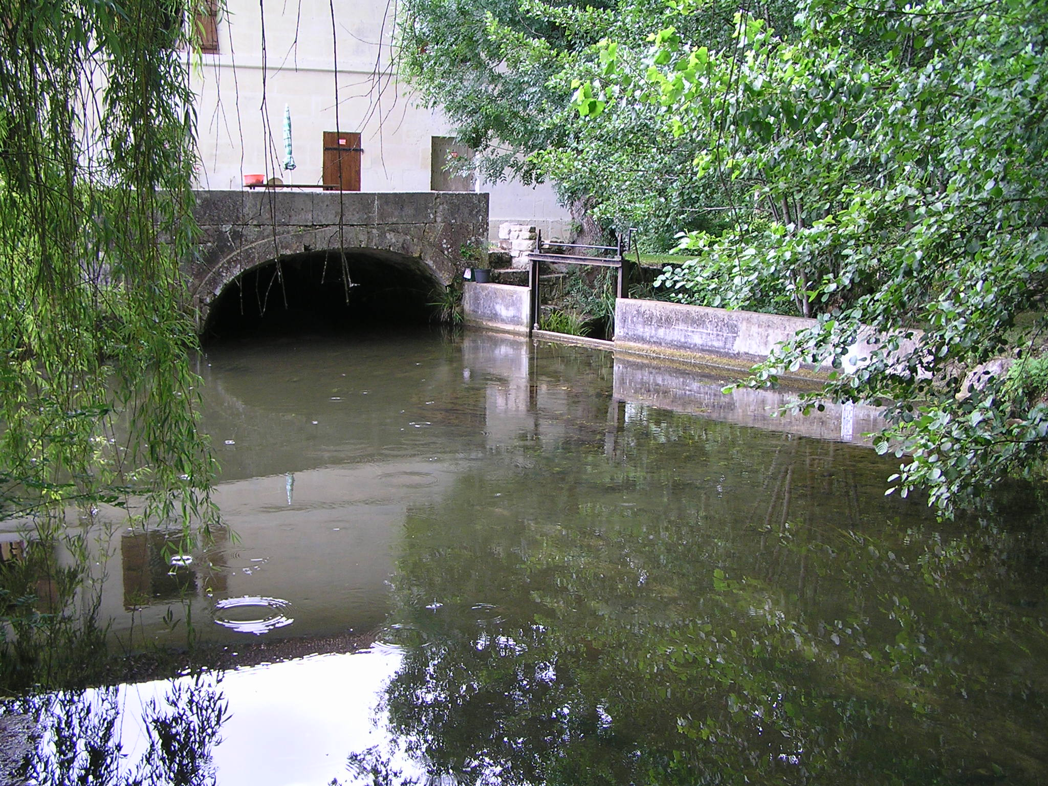 Moulin de Chazotte